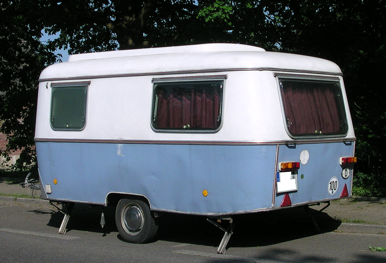 Eriba Wohnwagen “Triton”, gebaut Ende der 1970er Jahre(?)